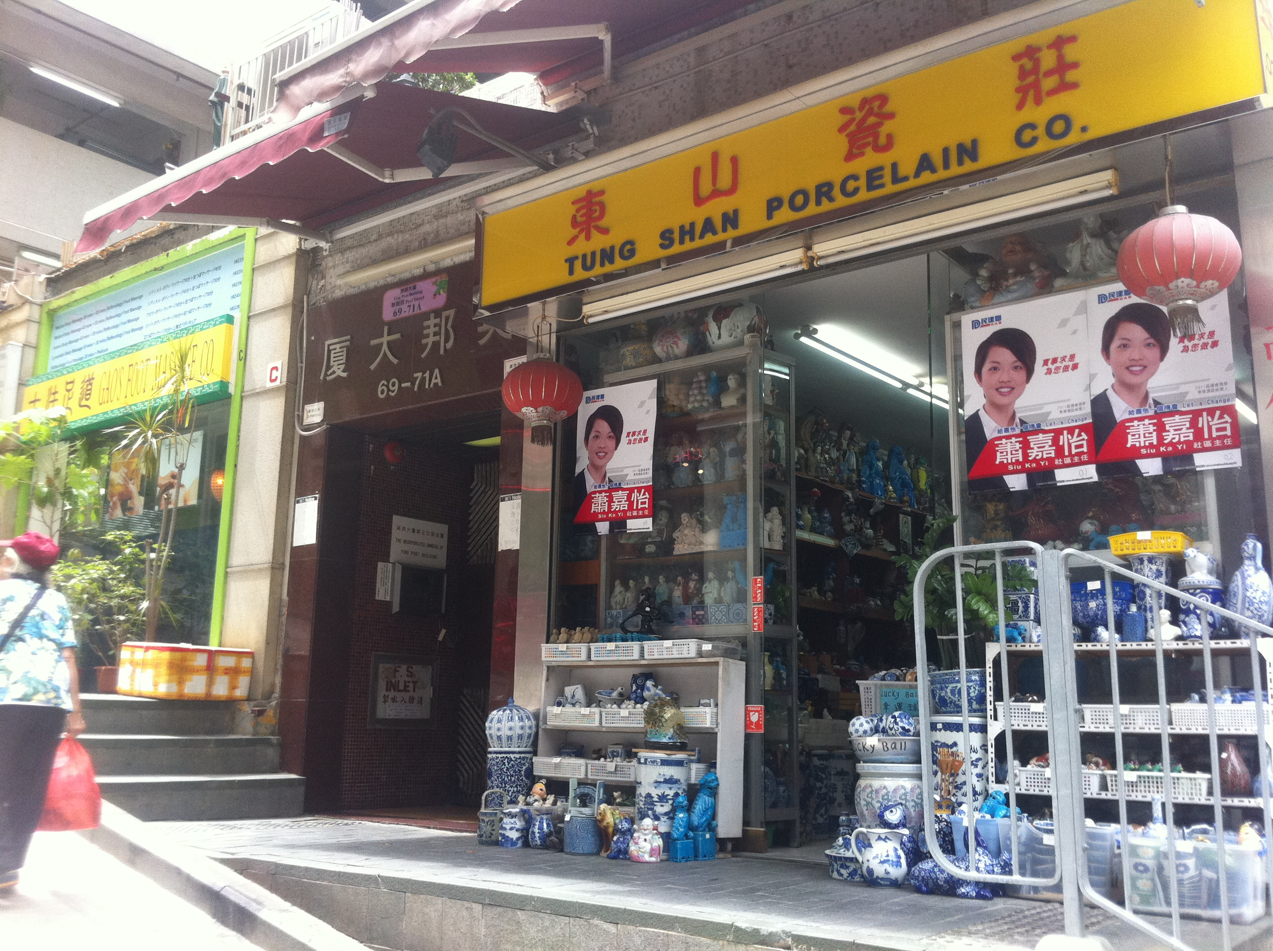 中文（香港）: 中環卑利街zh:英邦大廈